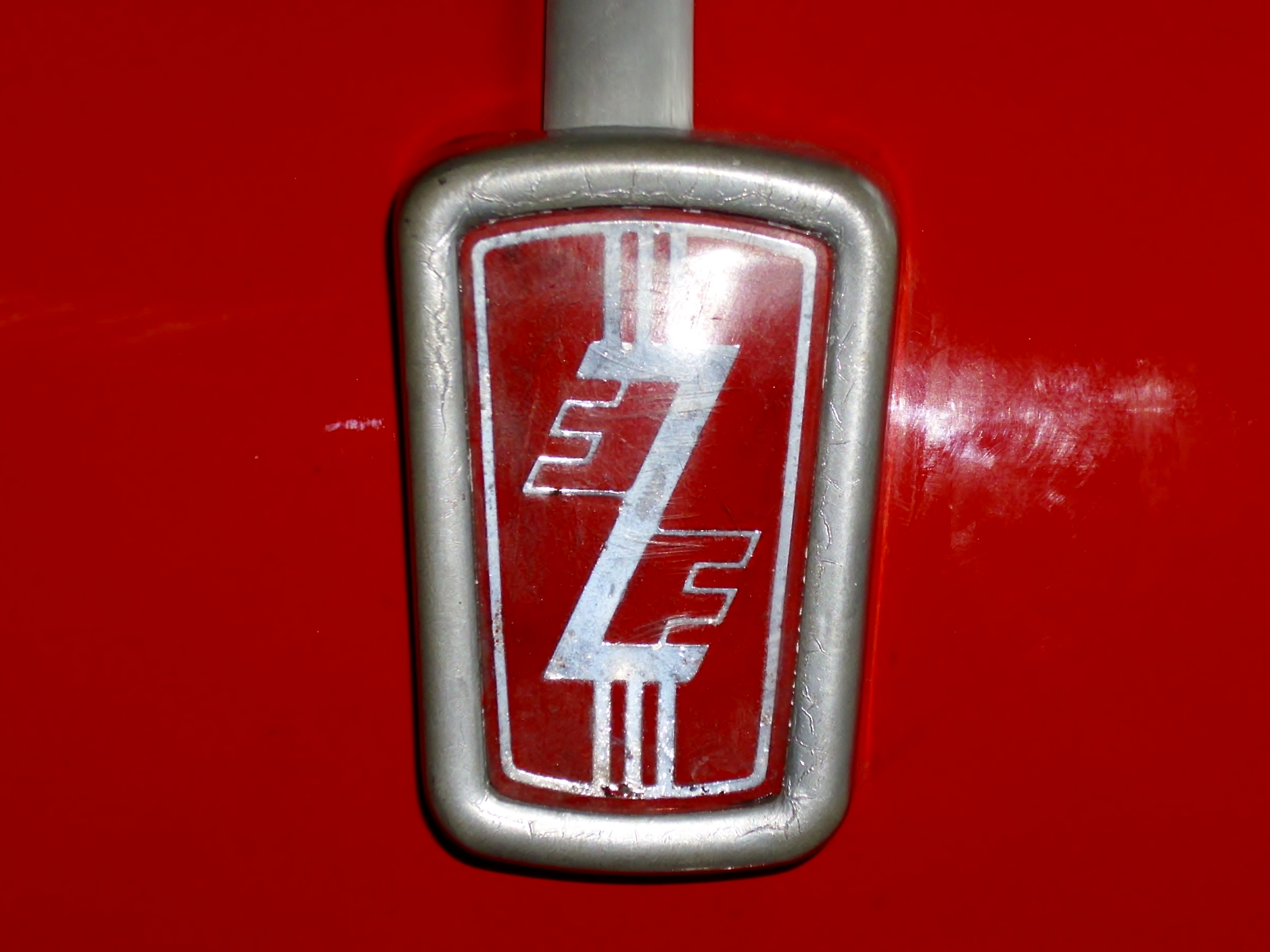 Emblem Zastava